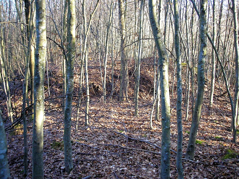 Burgstall "im Viehtrieb" bei Straßberg (Stadt Bobingen, Landkreis Augsburg, Bayerisch-Schwaben). Der Frontwall der Hauptburg von Westen. Eigene Aufnahme, Feb. 2008 / Former castle or hill fort "im Viehtrieb" near Straßberg (Bobingen near Augsburg, Bavaria, Germany). The central castle from the west. Own photo, Feb. 2008